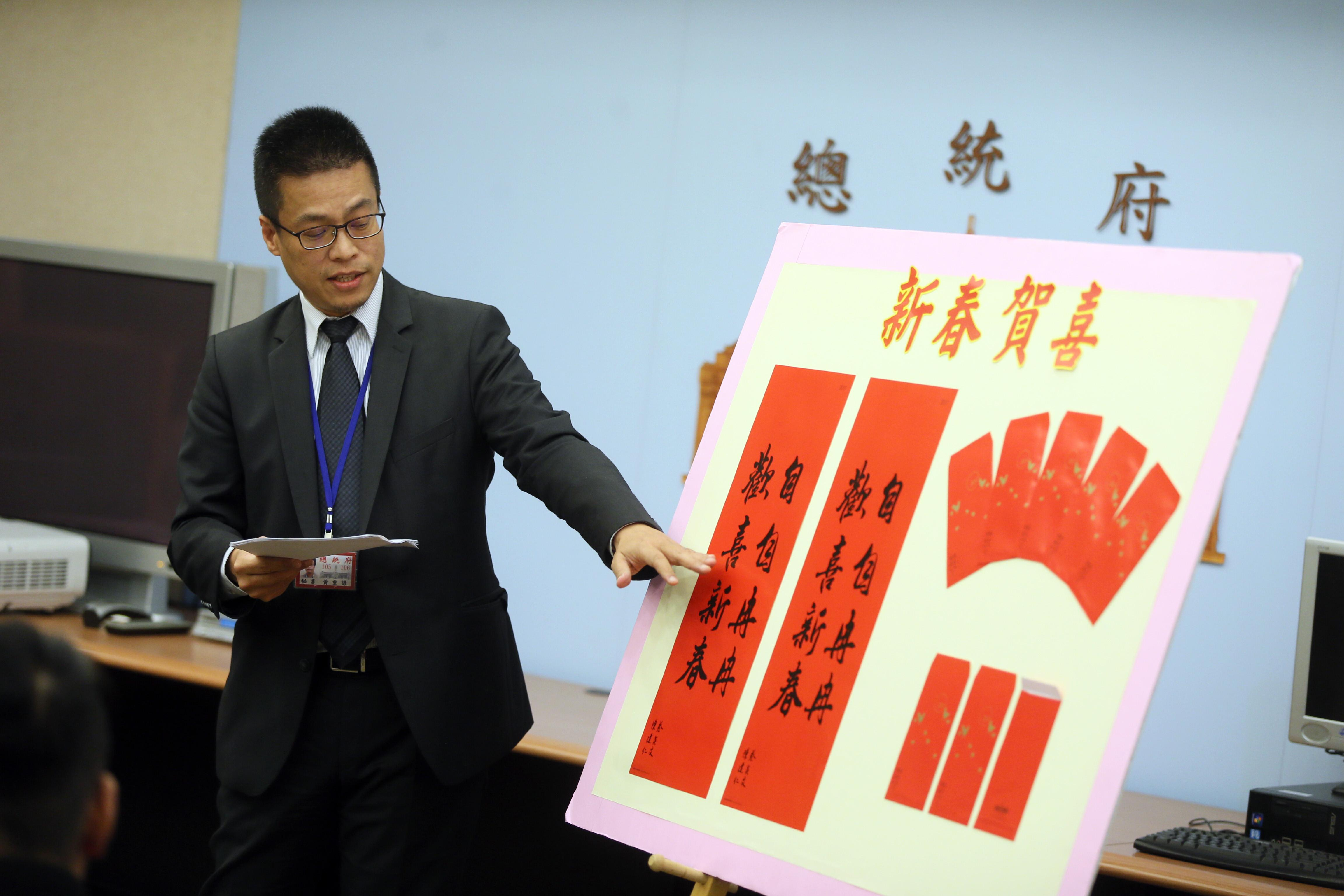 中華民國總統府春聯及紅包發佈記者會，總統府發言人黃重諺說明春聯及紅包式樣。